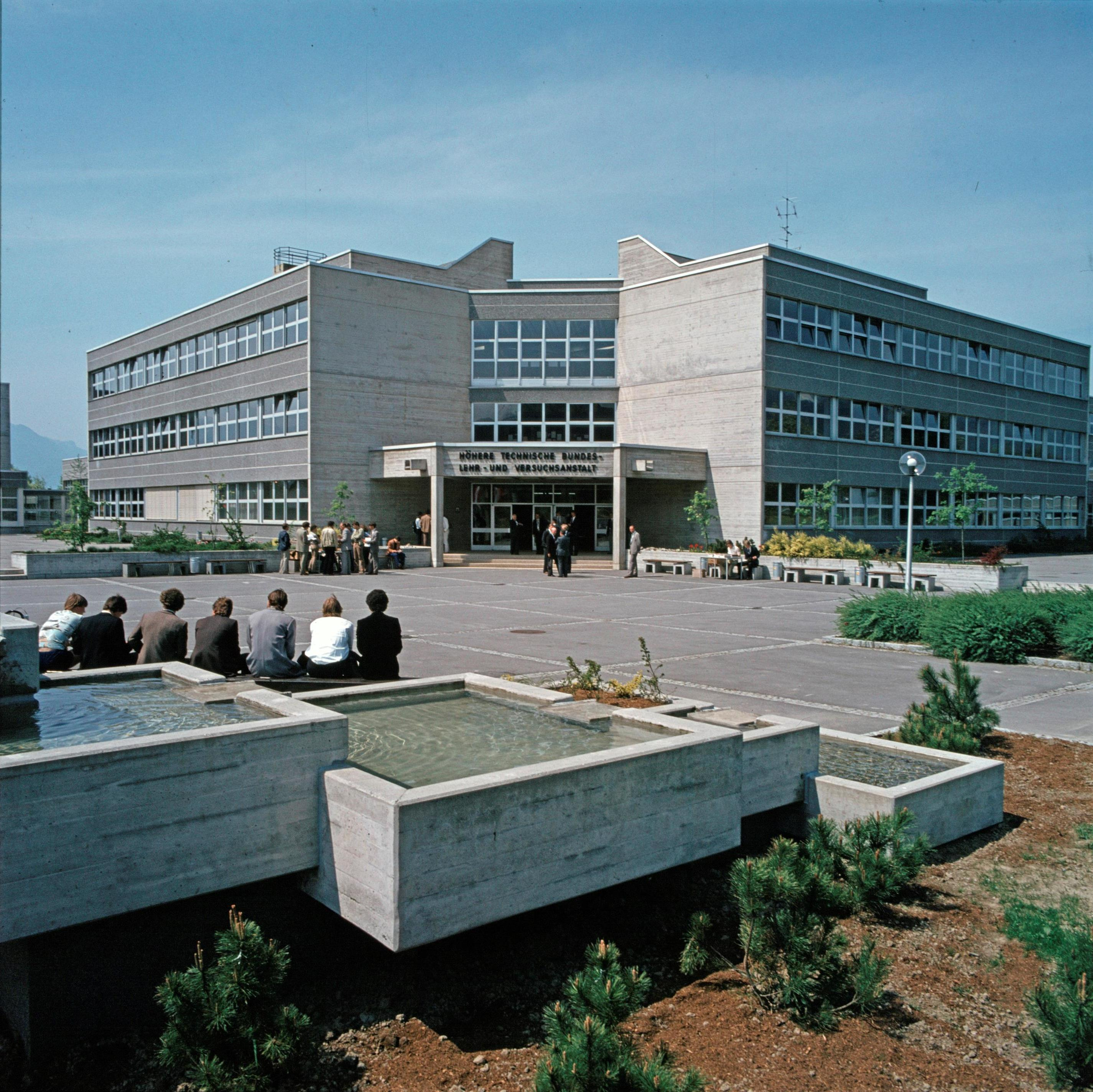 Das Gebäude der HTL Rankweil wenige Jahre nach der Fertigstellung, hier im Jahr 1980.